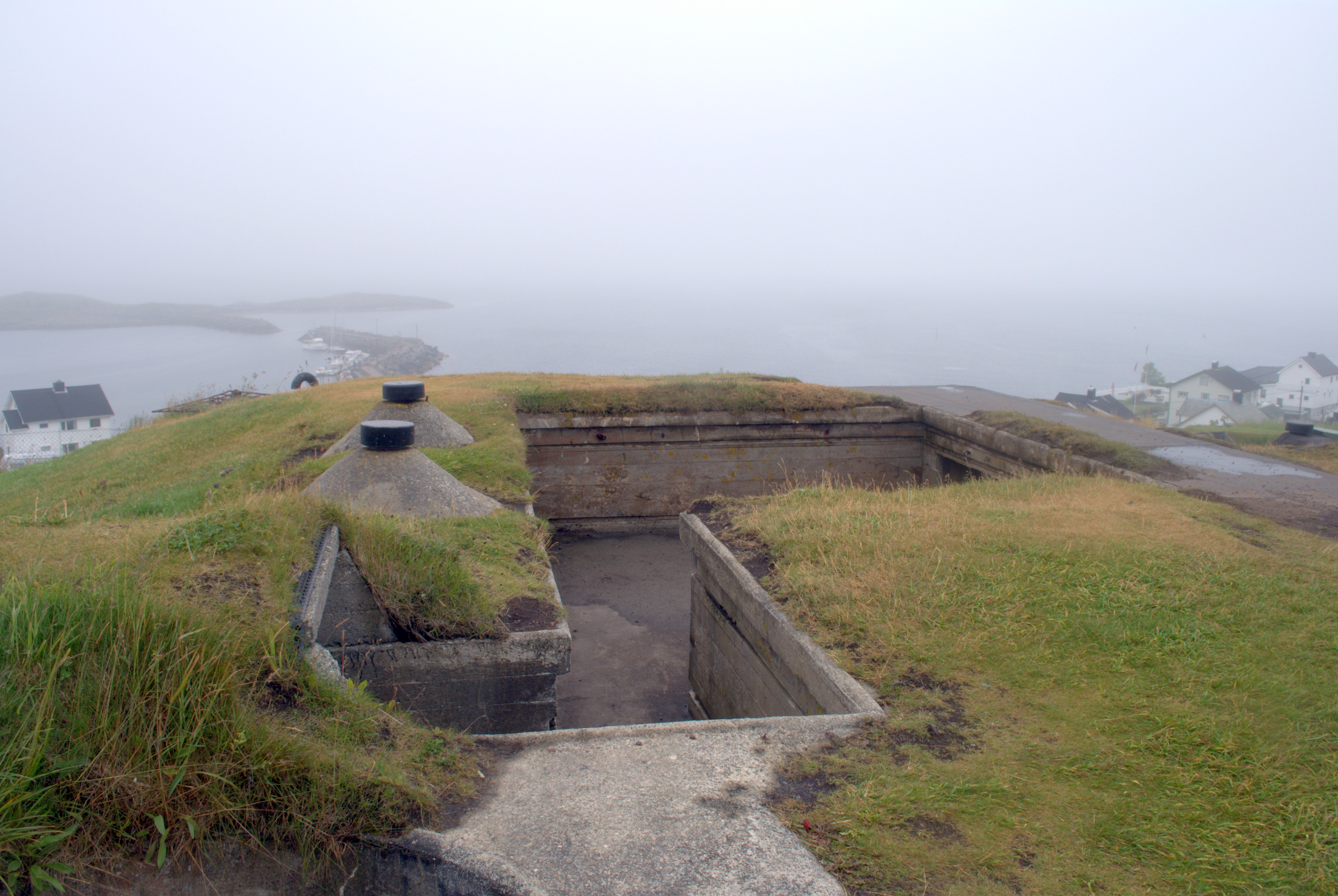 Detaljer fra Ergan kystfort ved Bud i Møre og Romsdal